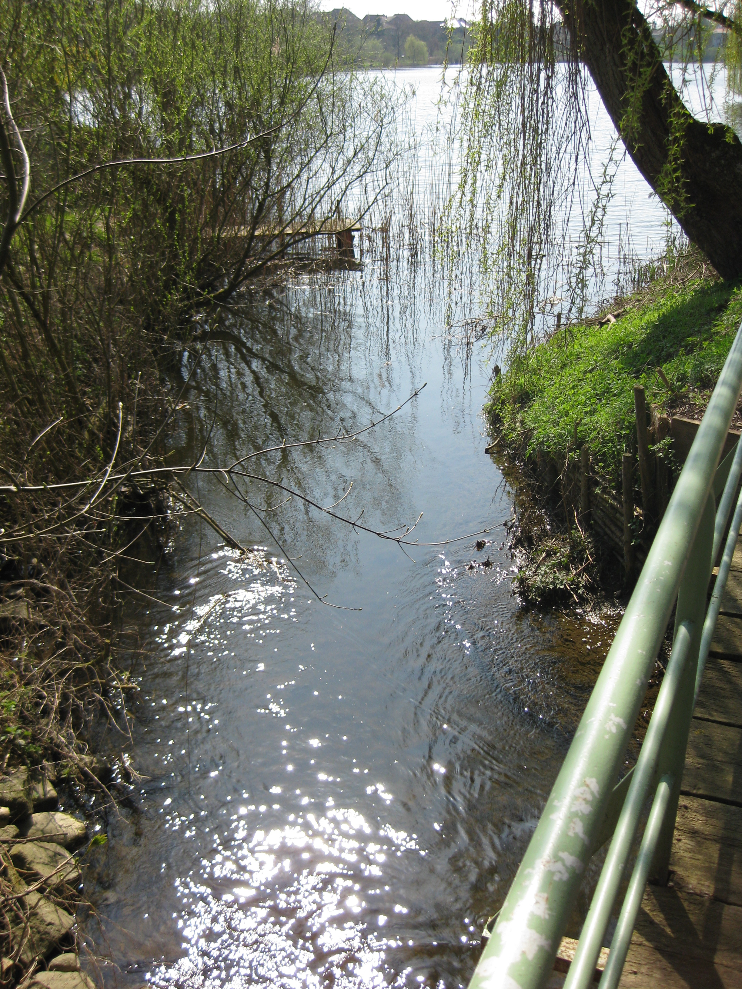 Abfluss des Oberteichs in Schönberg, Mecklenburg, zur Maurine. Beim Prolliusstieg an der Lübecker Straße